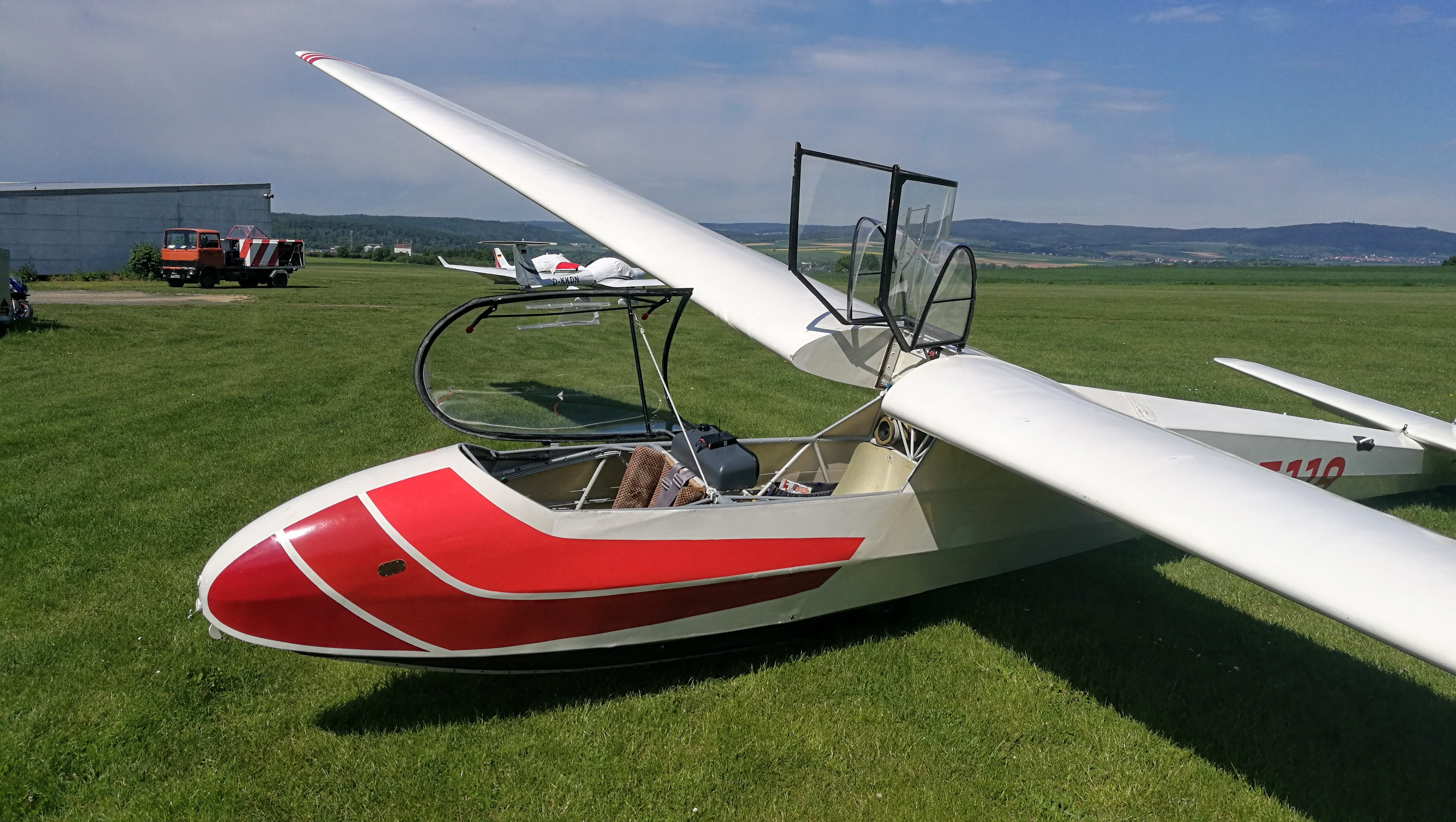 Schleicher K 7 mit offenen Hauben